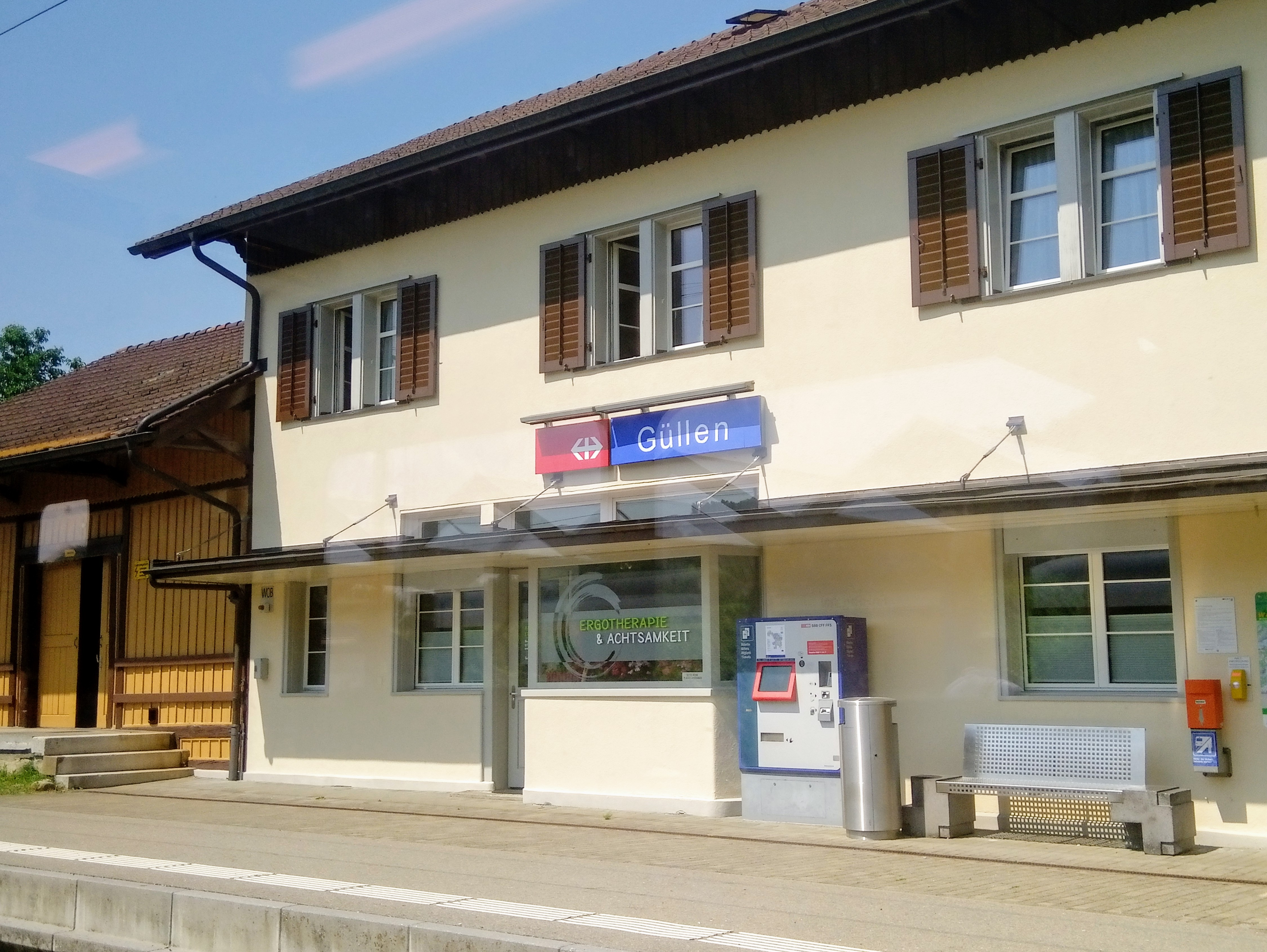 Der Bahnhof Berlingen mit temporärer Beschriftung anlässlich einer Aufführung von Friedrich Dürrenmatts Besuch der alten Dame anfang Juli 2019.